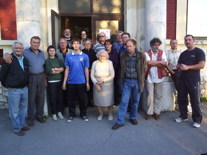 en: Đola 2006., art colony, Darda, 2006. Đola 2006., likovna kolonija, Darda, 2006.